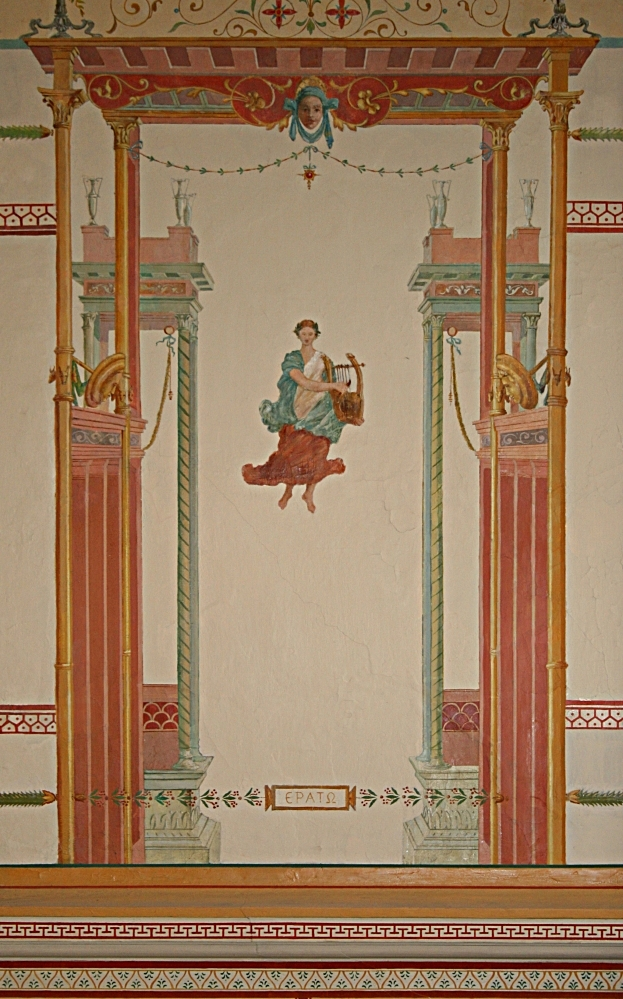 Muze, rad Ivana Tišova